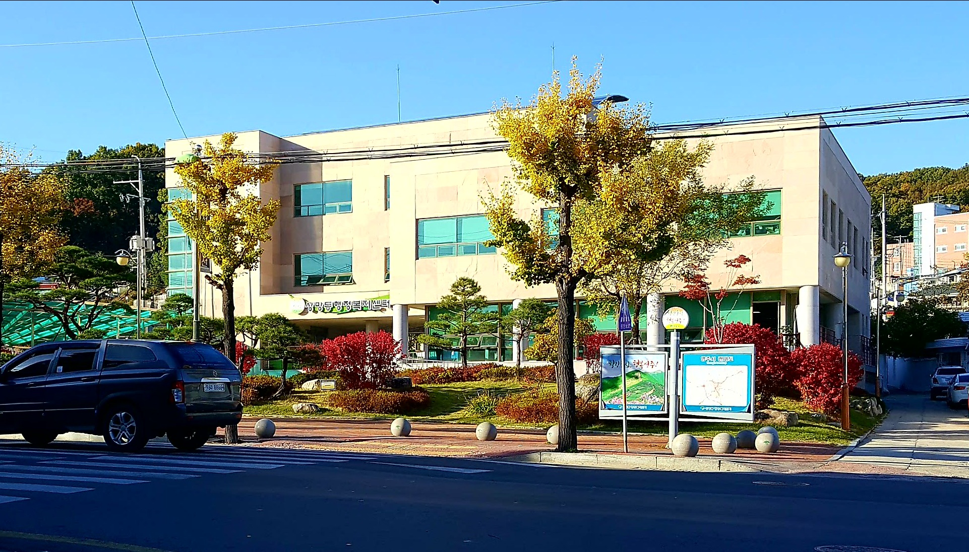 영주시 상망동행정복지센터